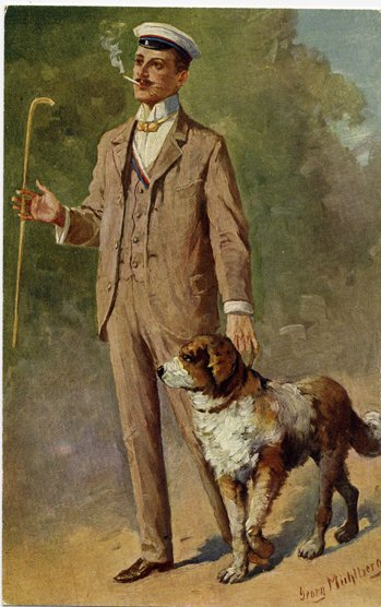 „Ein flotter Bursche“, Illustration um 1900, Ideal-Darstellung eines „flotten“ jungen Studenten, gekleidet nach der neuesten Mode der Zeit, mit Zigarette, Spazierstöckchen und Hund